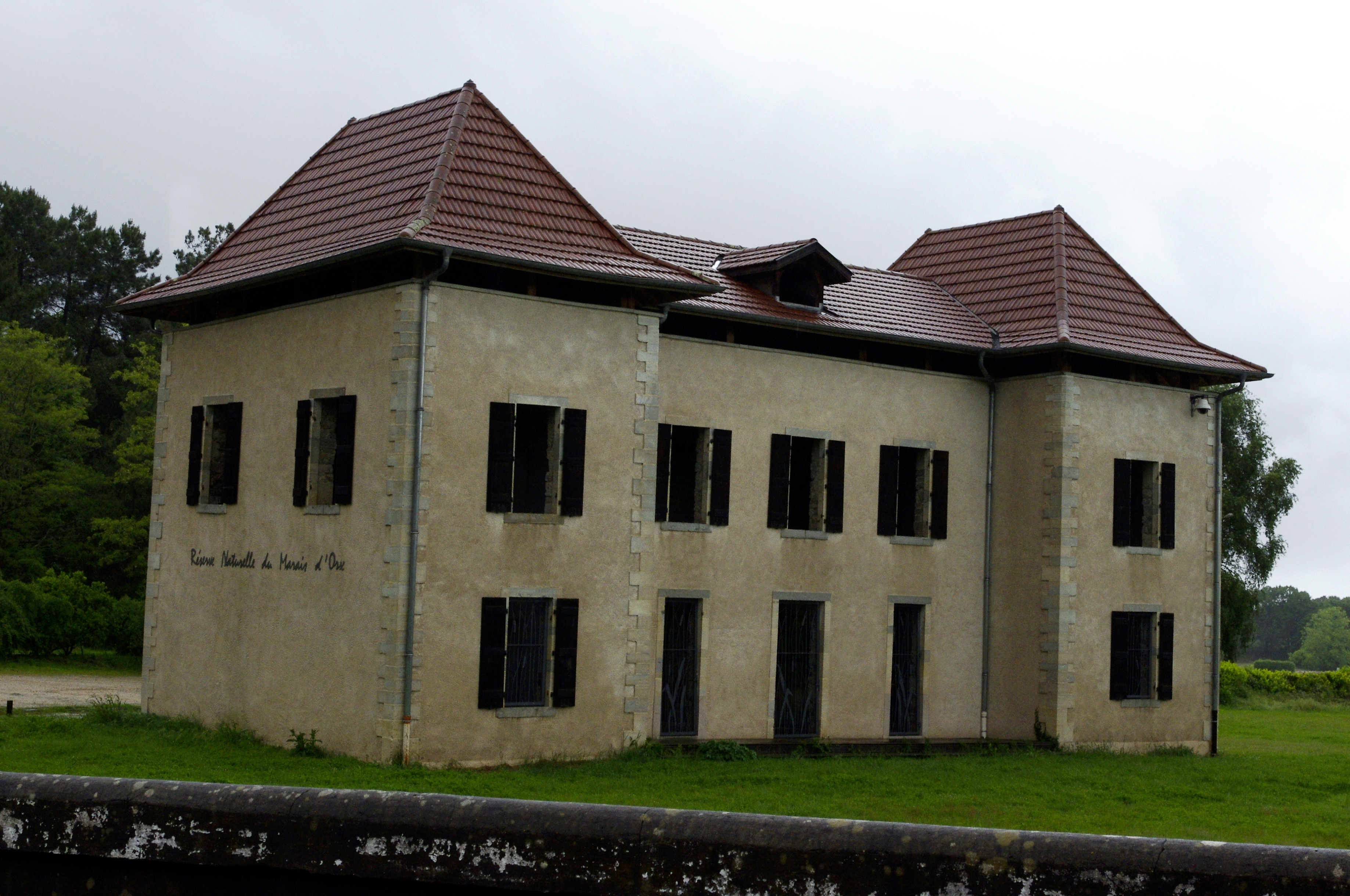 Le marais d'Orx au moment des fortes pluies du mois de mai 2013.